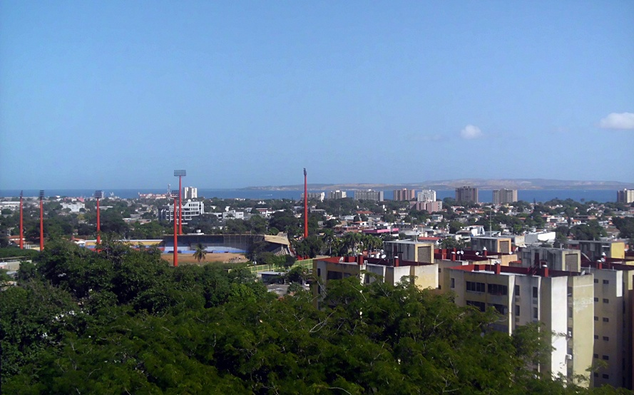 vista del noreste de la ciudad de cumaná estado sucre